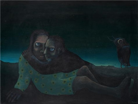 Jože Tisnikar, Ljubezen, 1977.